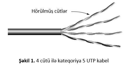 4 cütü ilə kateqoriya 5 UTP kabel